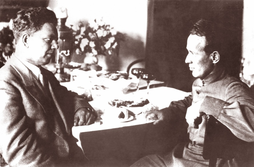 М.А. Шолохов и А.И. Бусыгин. 1930-е гг.